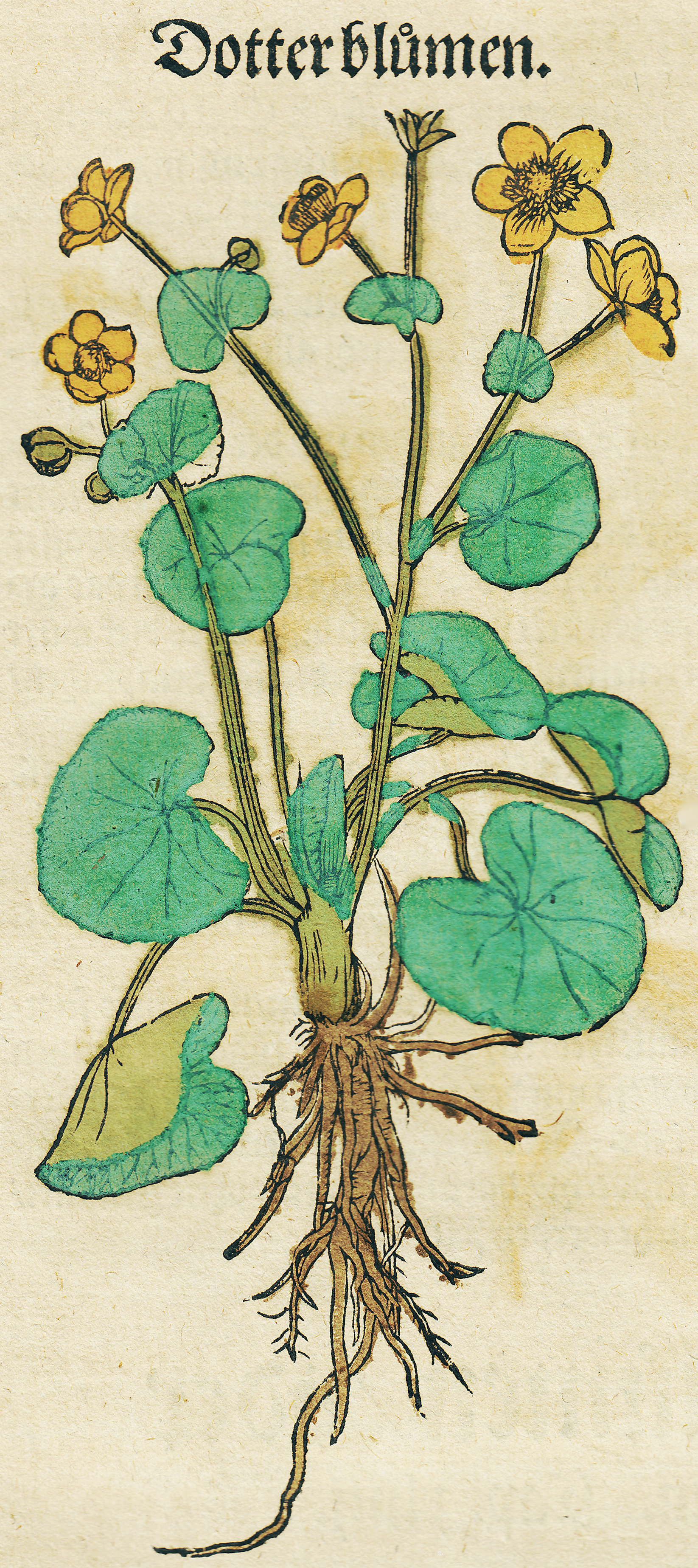 Abbildung der Sumpfdotterblume im Kräuterbuch des Hieronymus Bock.